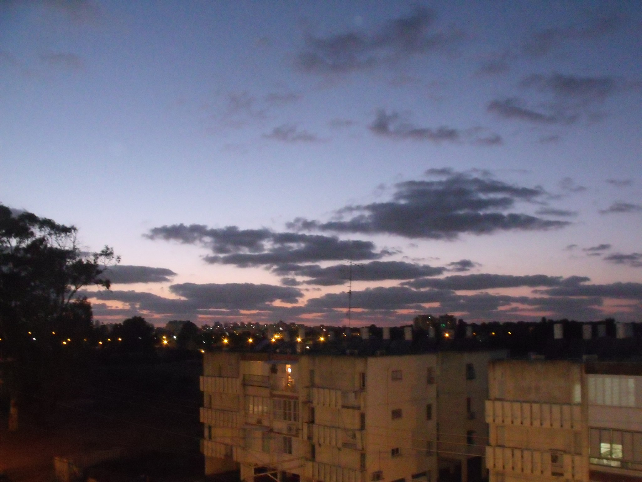 שקיעה בעמישב.